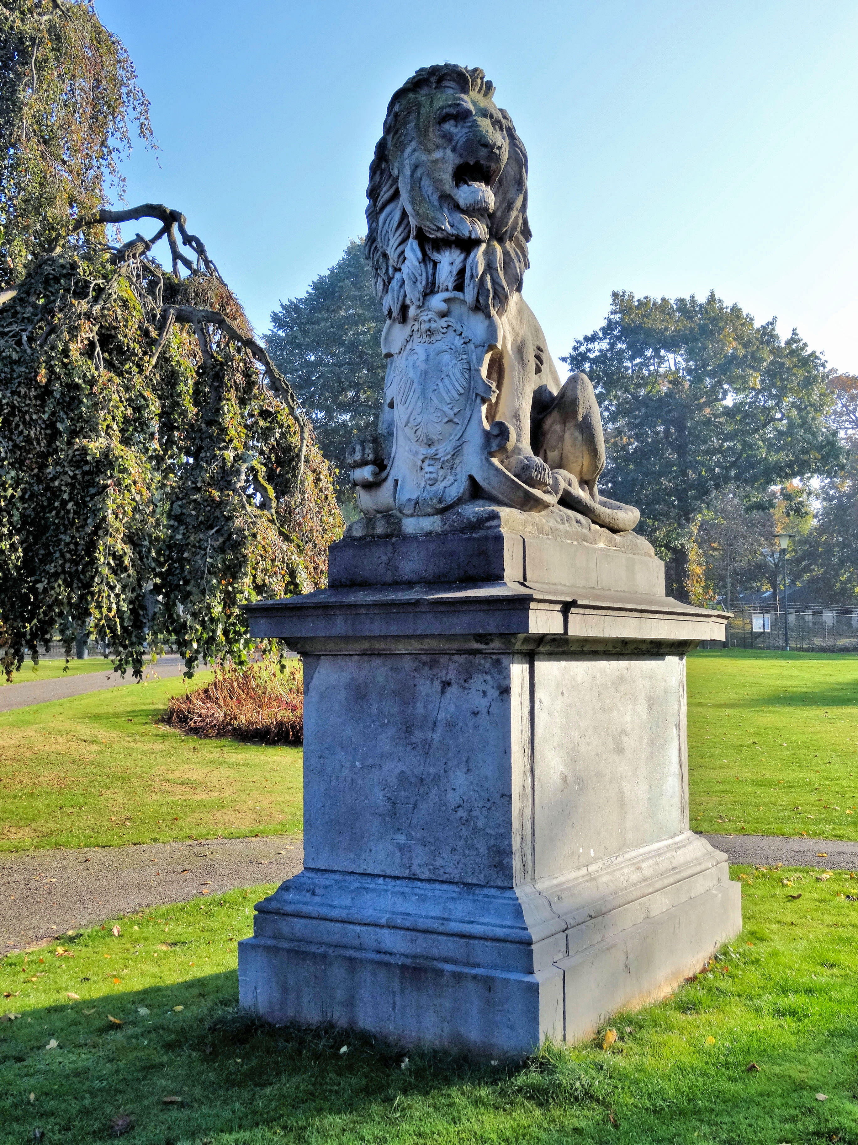 Leeuw in het Kronenburgerpark (1886) in Nijmegen. Gemaakt door Henri Leeuw sr. en Henri Leeuw jr.